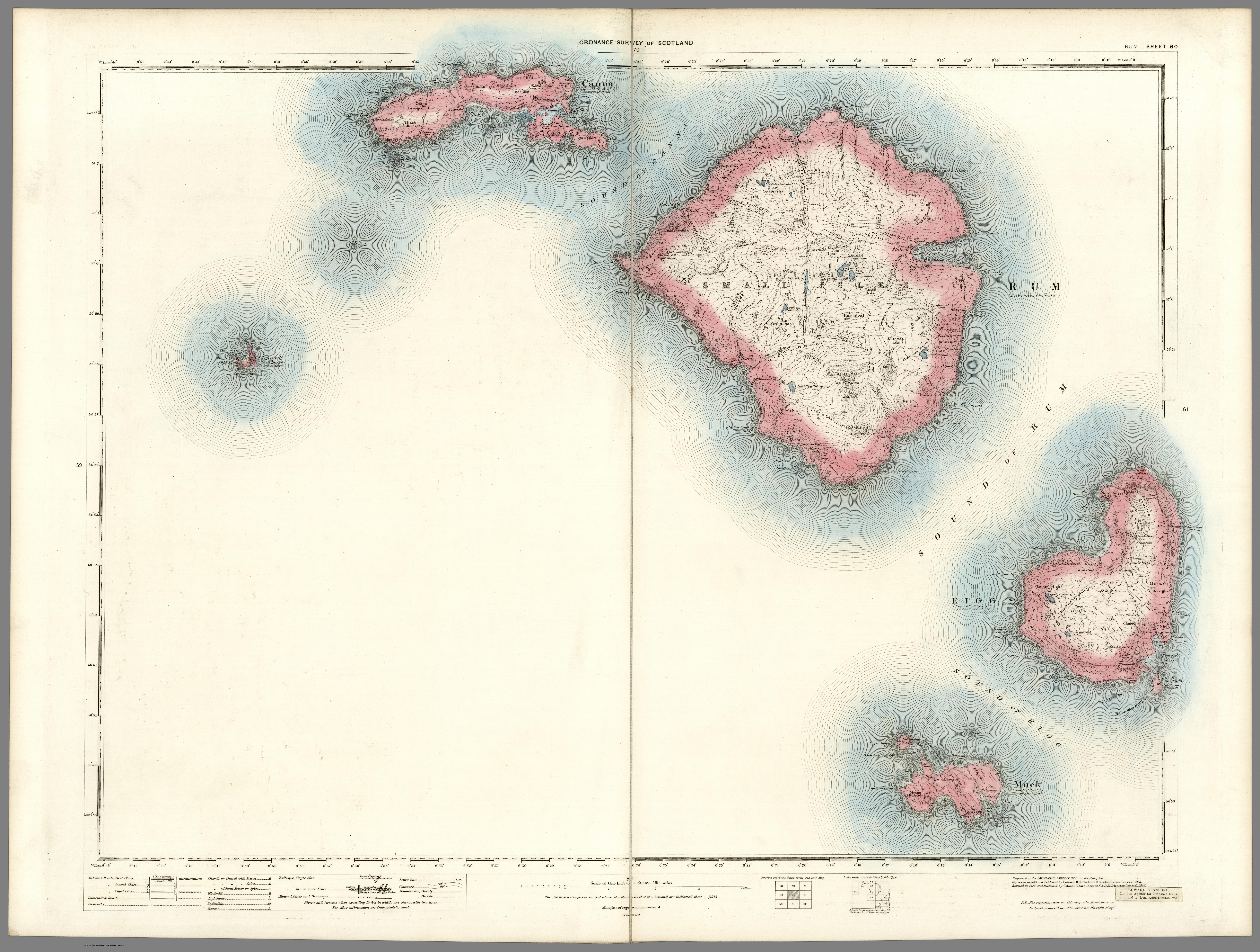 Small Isles, ScotlandVolume 2: Sheet 60 - Rum